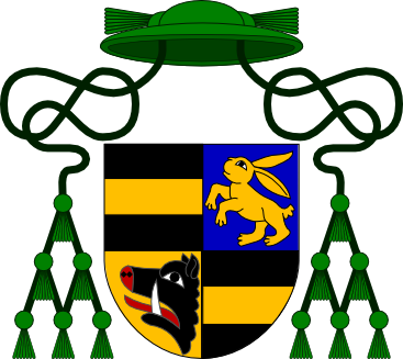 Heraldický znak 5. arcibiskupa pražského